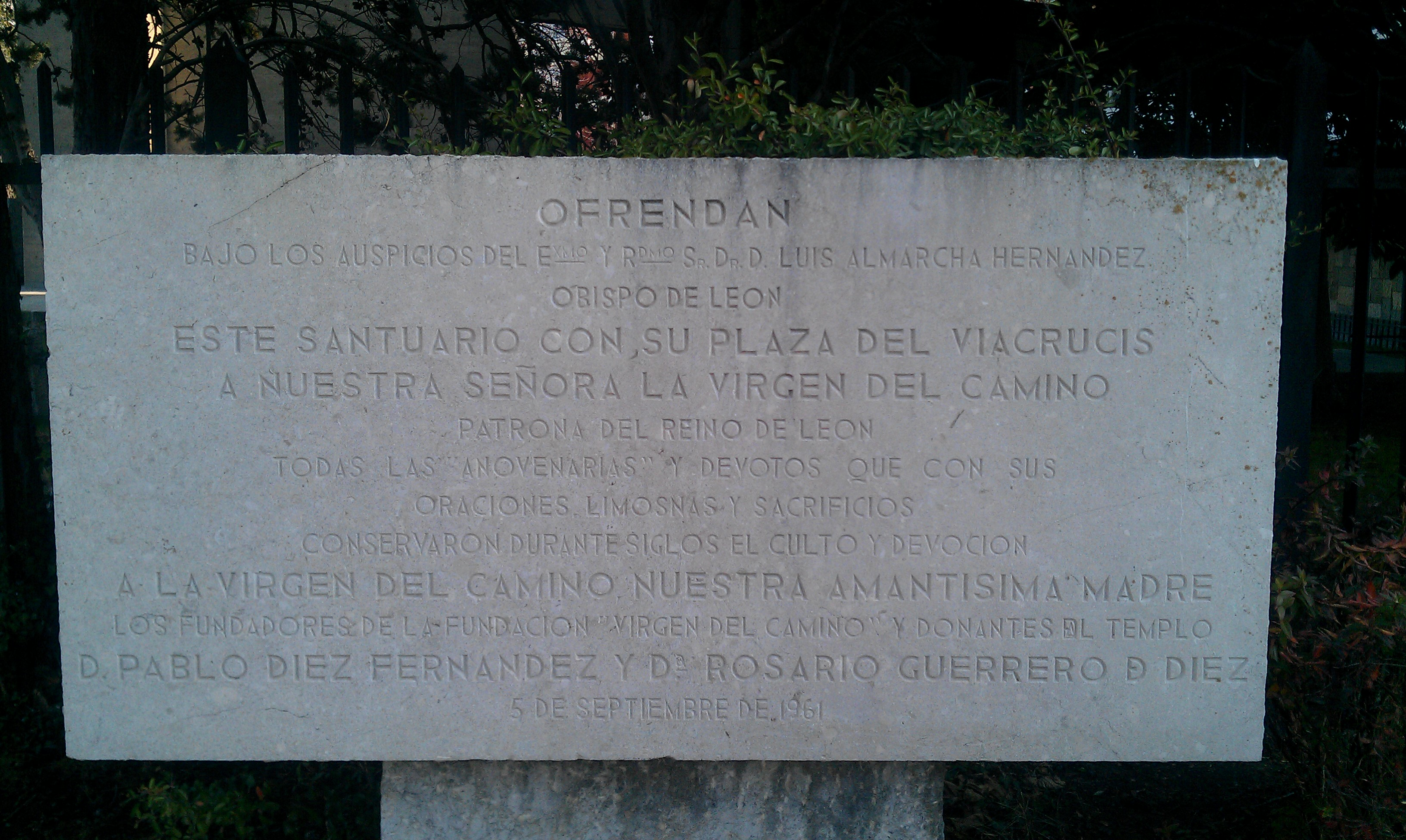 Placa de ofrenda a la Virgen del Camino, en La Virgen del Camino (León, España).